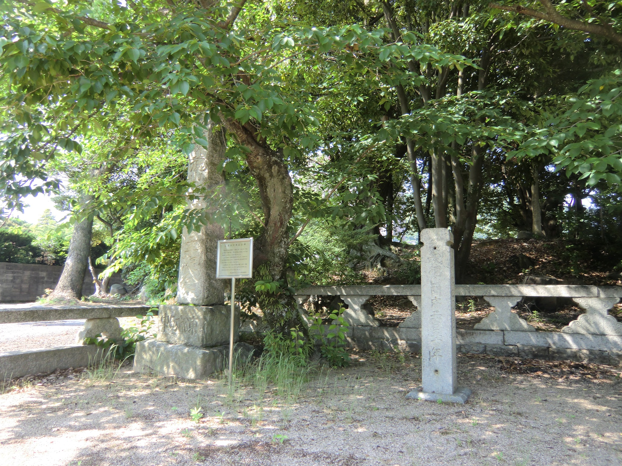 祐綏神社にある徳山開府250年の記念碑（山口県周南市）